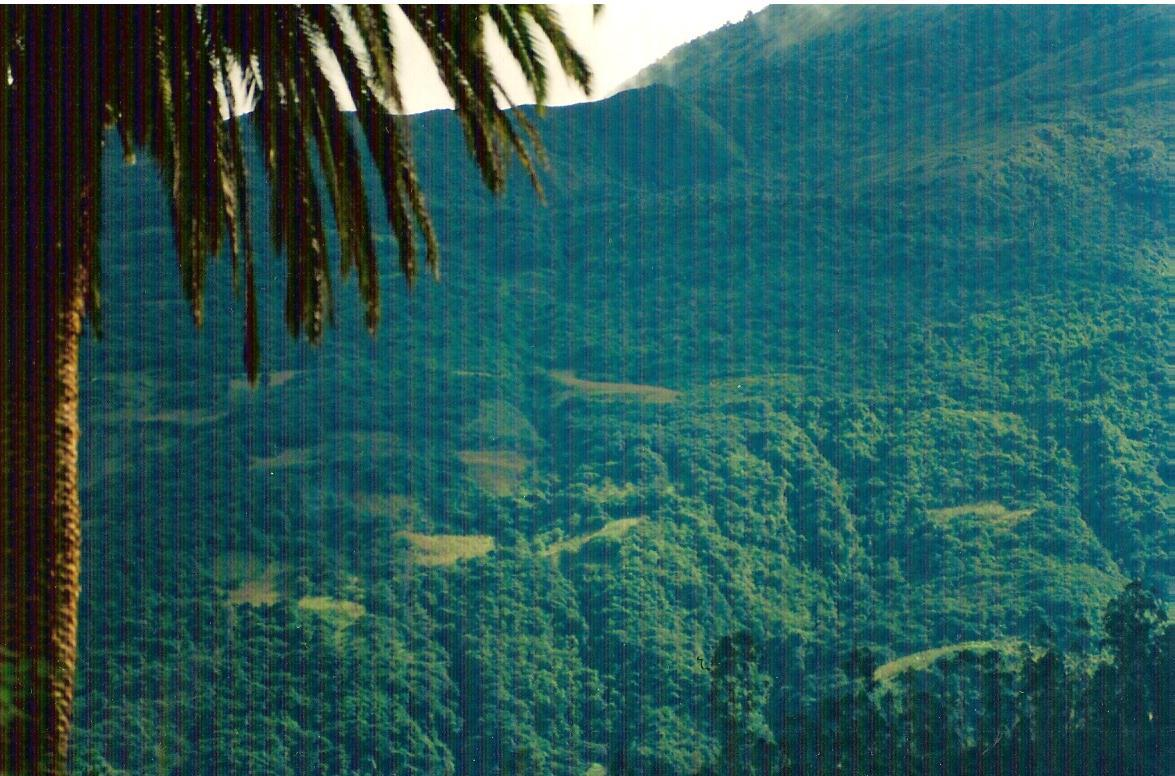 Le domaine Purani Churiquimbaya vu du village de Sorata (Larecaja, Bolivie)